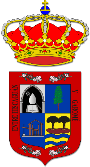 El escudo de armas de Puntagorda tiene forma portuguesa y cuartelado. Primero, de plata, un arco gótico ojival de sable, cargado de un Libro Sagrado de plata surmontado de una mitra puesta sobre un báculo, ambos de plata. Segundo, de azur, un pino canario al natural. Tercero, de azur, un lagar de tea al natural. Cuarto, de oro, dos ondas de azur surmontadas de una isla al natural, cargada de dos dragos gemelos pareados y fustados. Bordura de gules, con cuatro ramas de almendro floridas, dos en jefe y dos en punta, con la leyenda “Entre Hiscaguán” en el flanco diestro y “y Garomé” en el flanco siniestro. Al timbre, corona real cerrada.